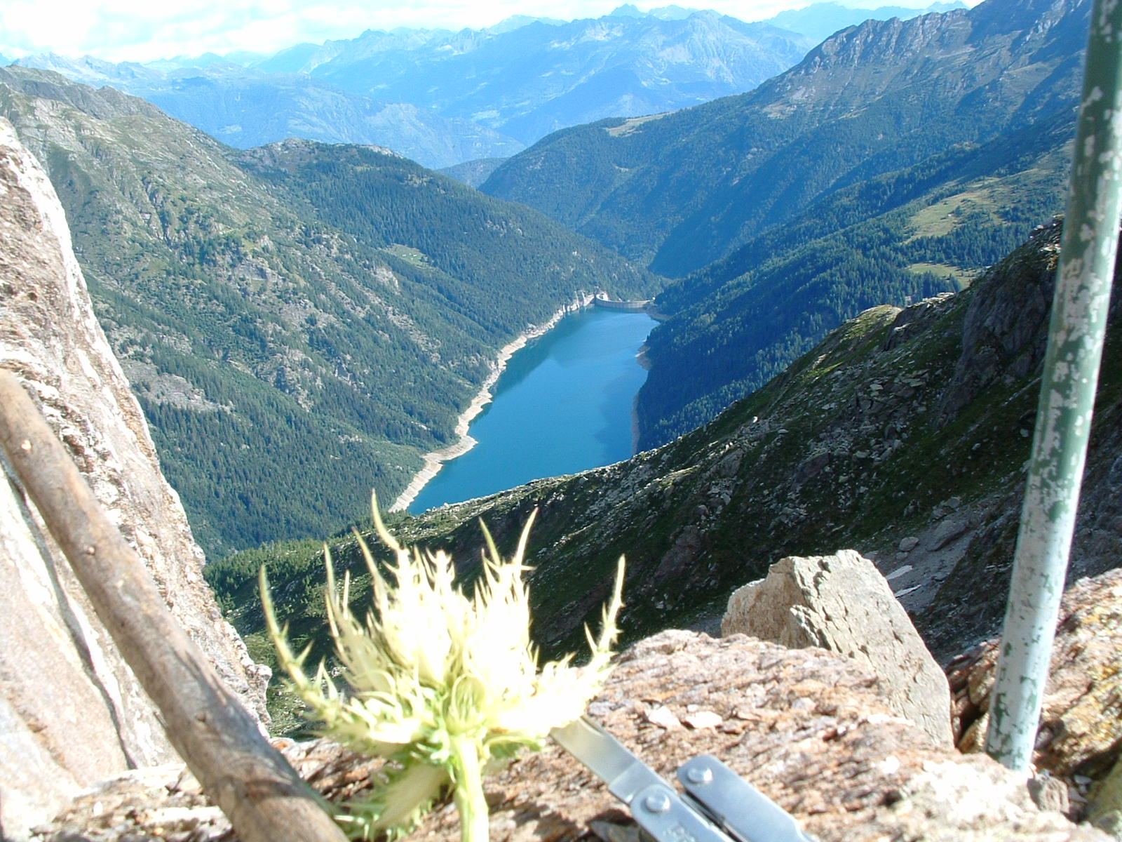 fatto da me